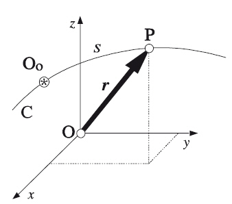 Definición de trayectoria de una partícula